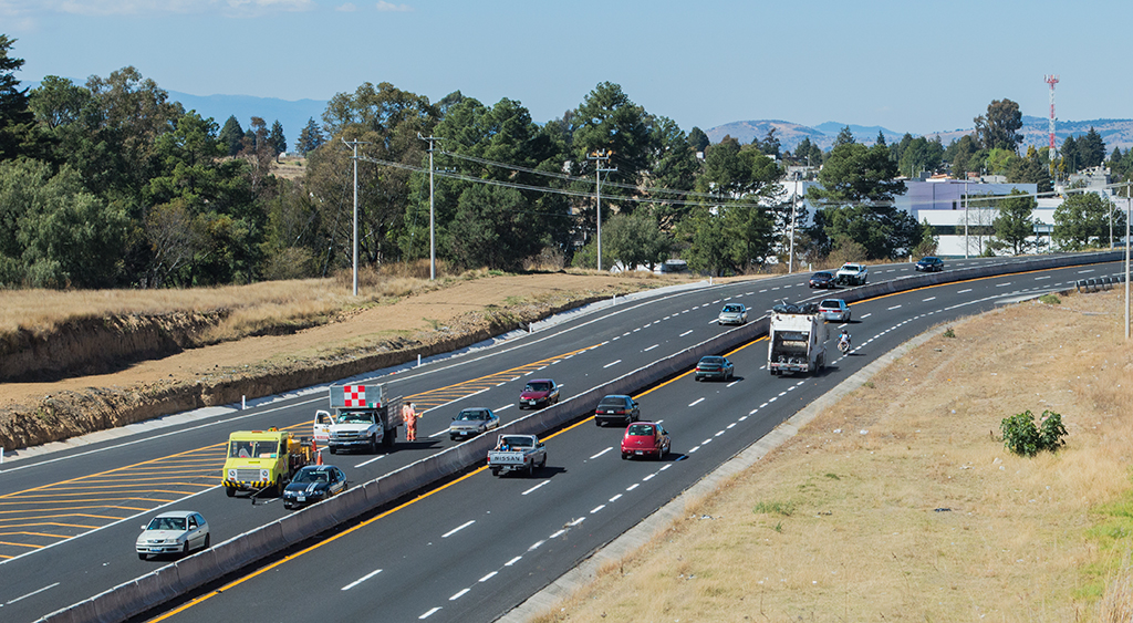 Periférico o Libramiento de Tlaxcala